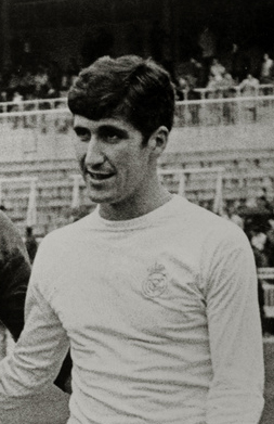 Título original: El fútbolista del Langreo José Luis Amilibia y el jugador del Real Madrid C.F. Marañón durante un partido amistoso Localización: Madrid (Madrid)